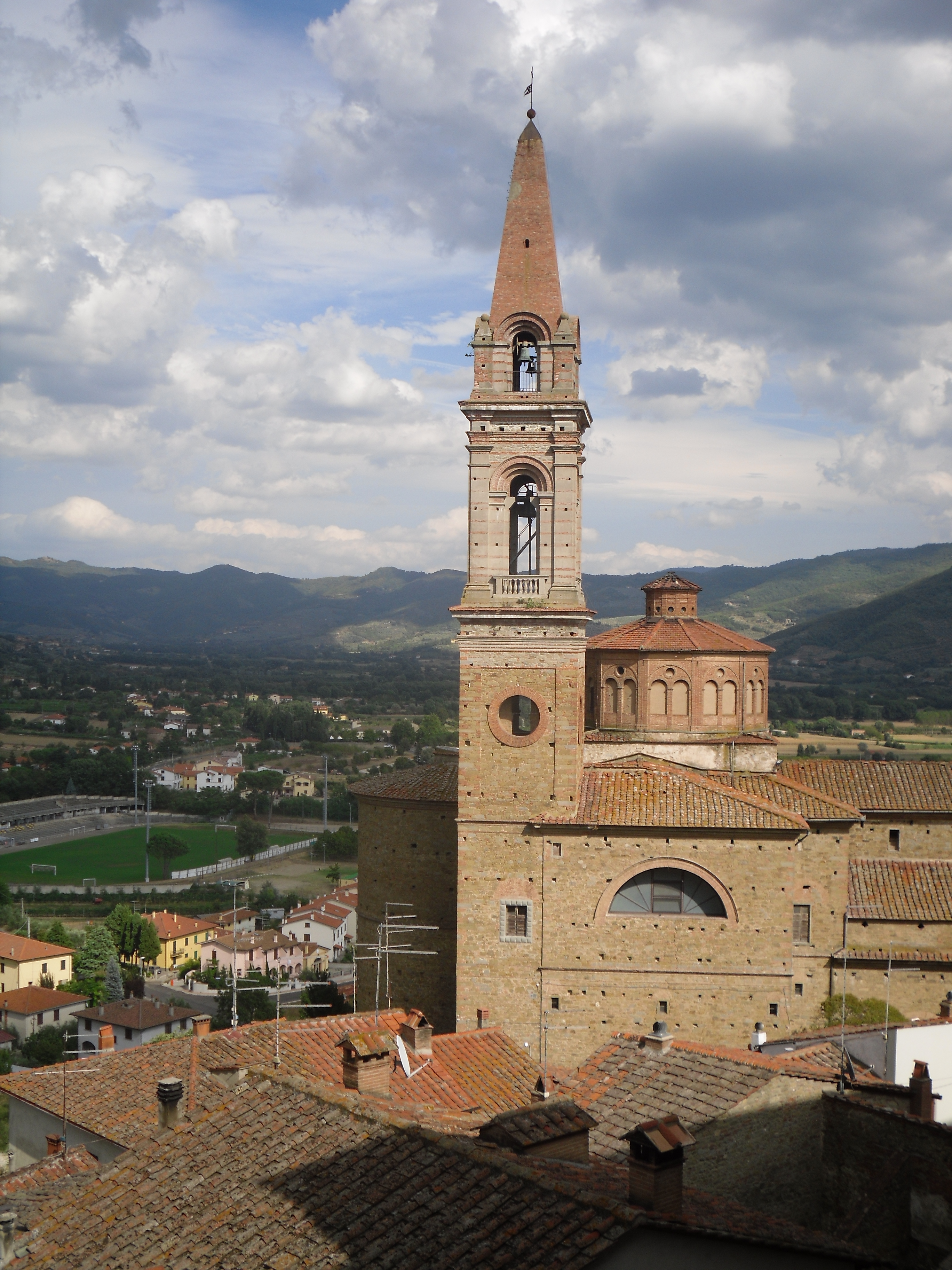 Collegiata di San Giuliano - Castiglion Fiorentino, Arezzo, Italia